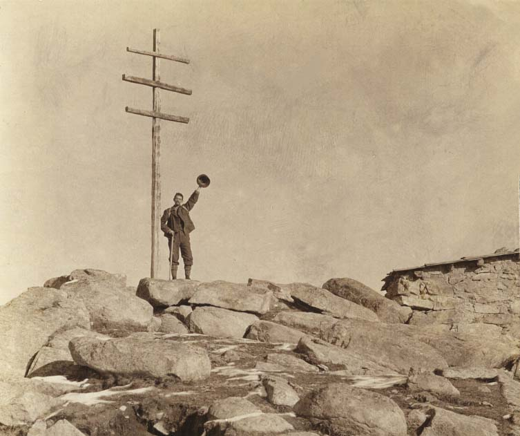 Emil Terschak beim Kreuz der Raschötzer Alm in Gröden